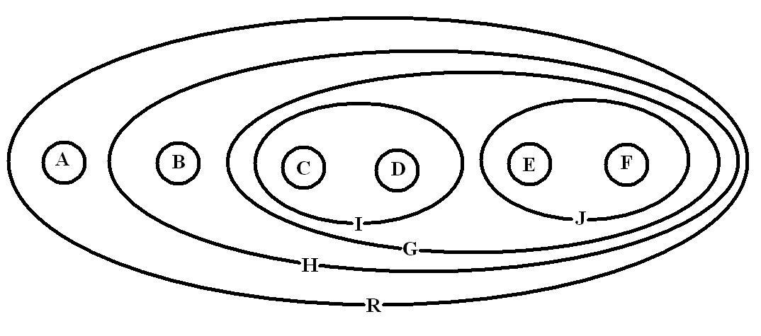 Représentation d'un cladogramme en diagramme de Venn